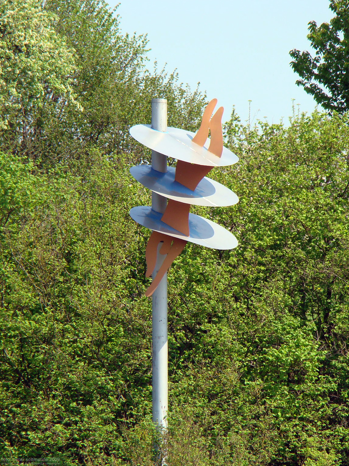 Stele von Hal Busse (Hannelore Bendixen-Busse) im Freibad in Heilbronn-Kirchhausen